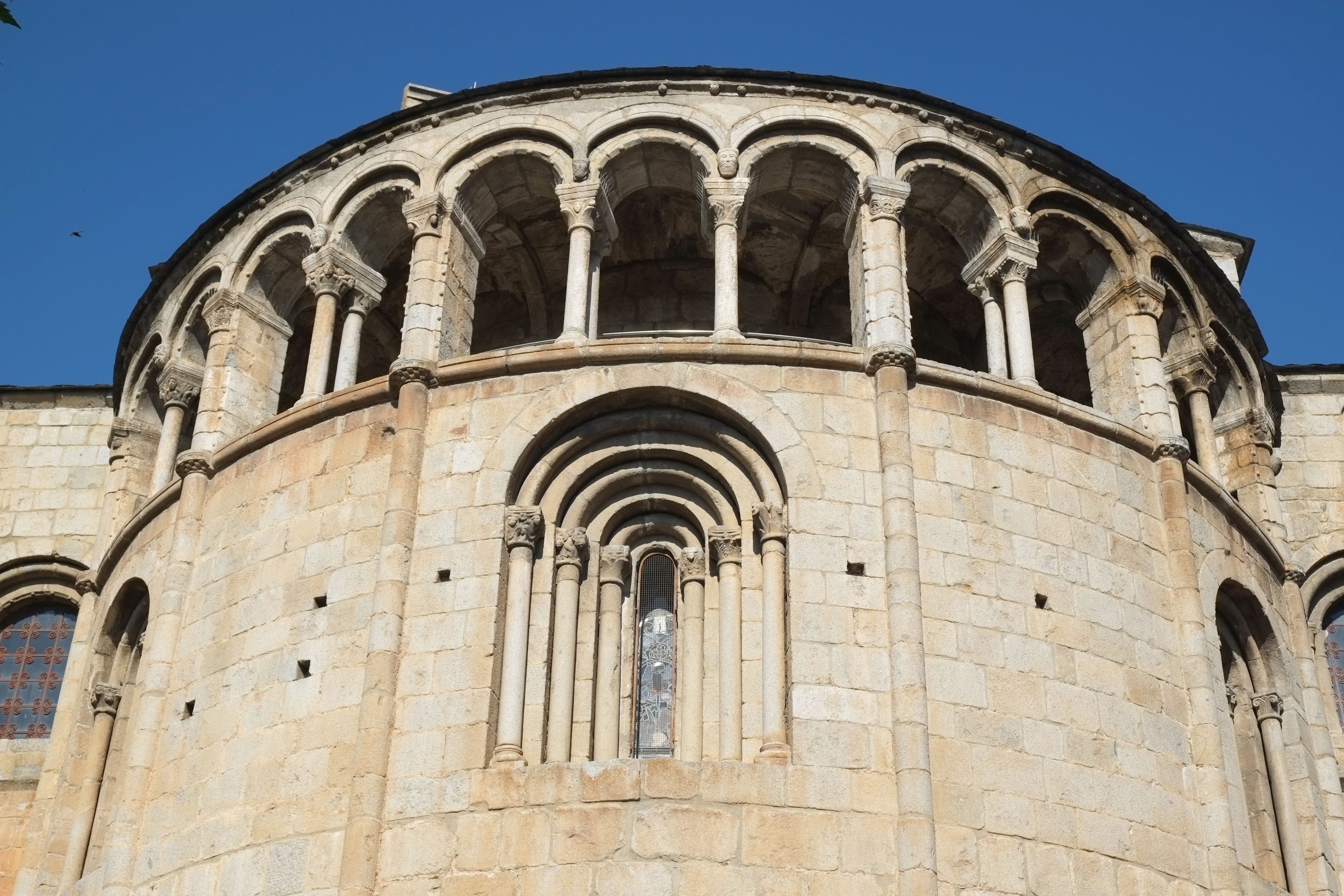 Kathedrale in La Seu d’Urgell in Katalonien (Spanien)